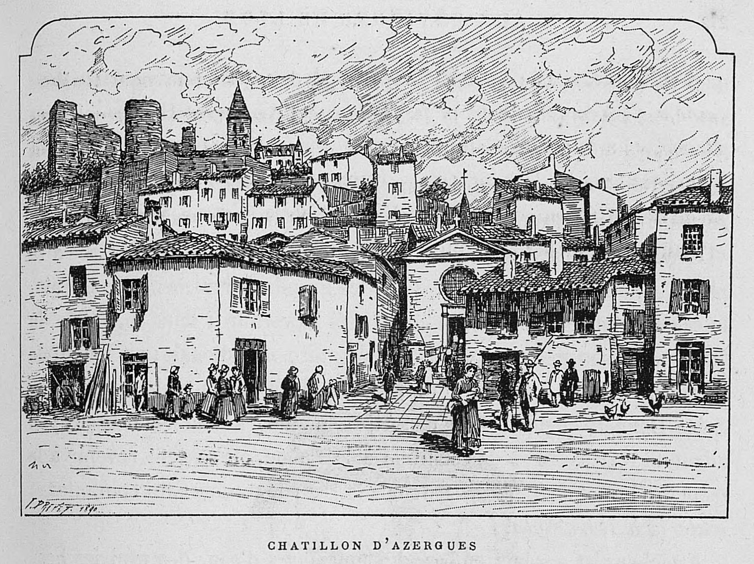 Aux environs de Lyon / Monsieur Josse ; préface de M. Coste-Labaume ; édition illustrée de 250 dessins de J. Drevet.